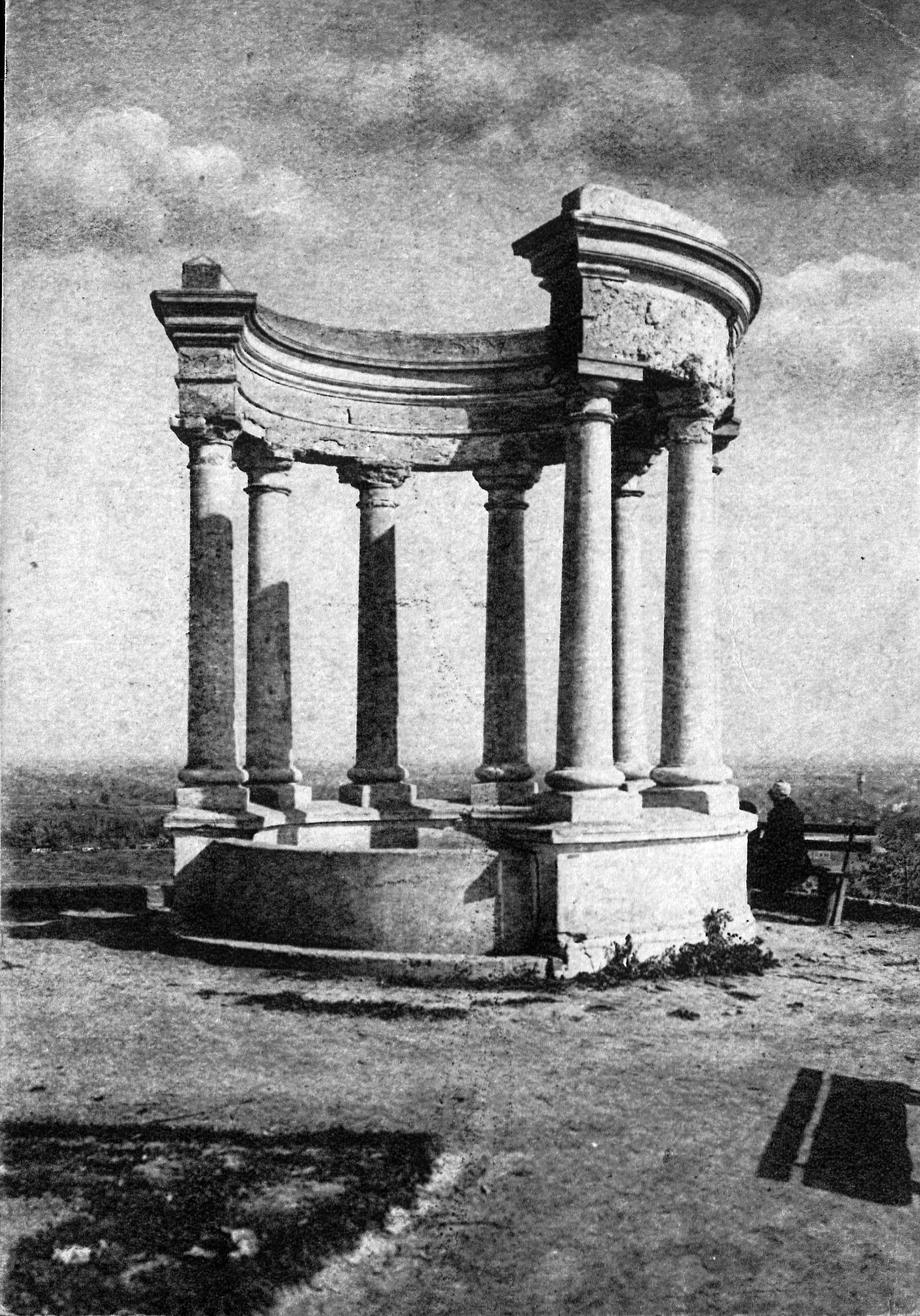 Старое фото Белой беседки в Полтаве.